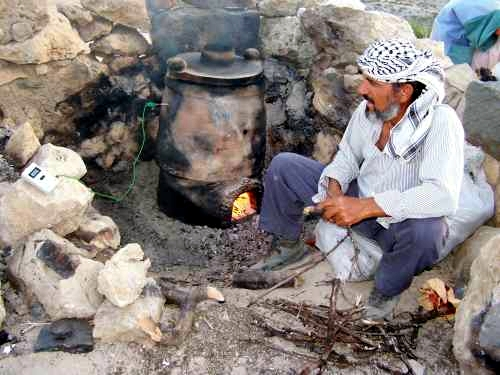 Keramikexperimente im Sommer 2006 am Tall Zira´a - Ausgrabung des BAI Wuppertal und DEI Jerusalem+Amman; und